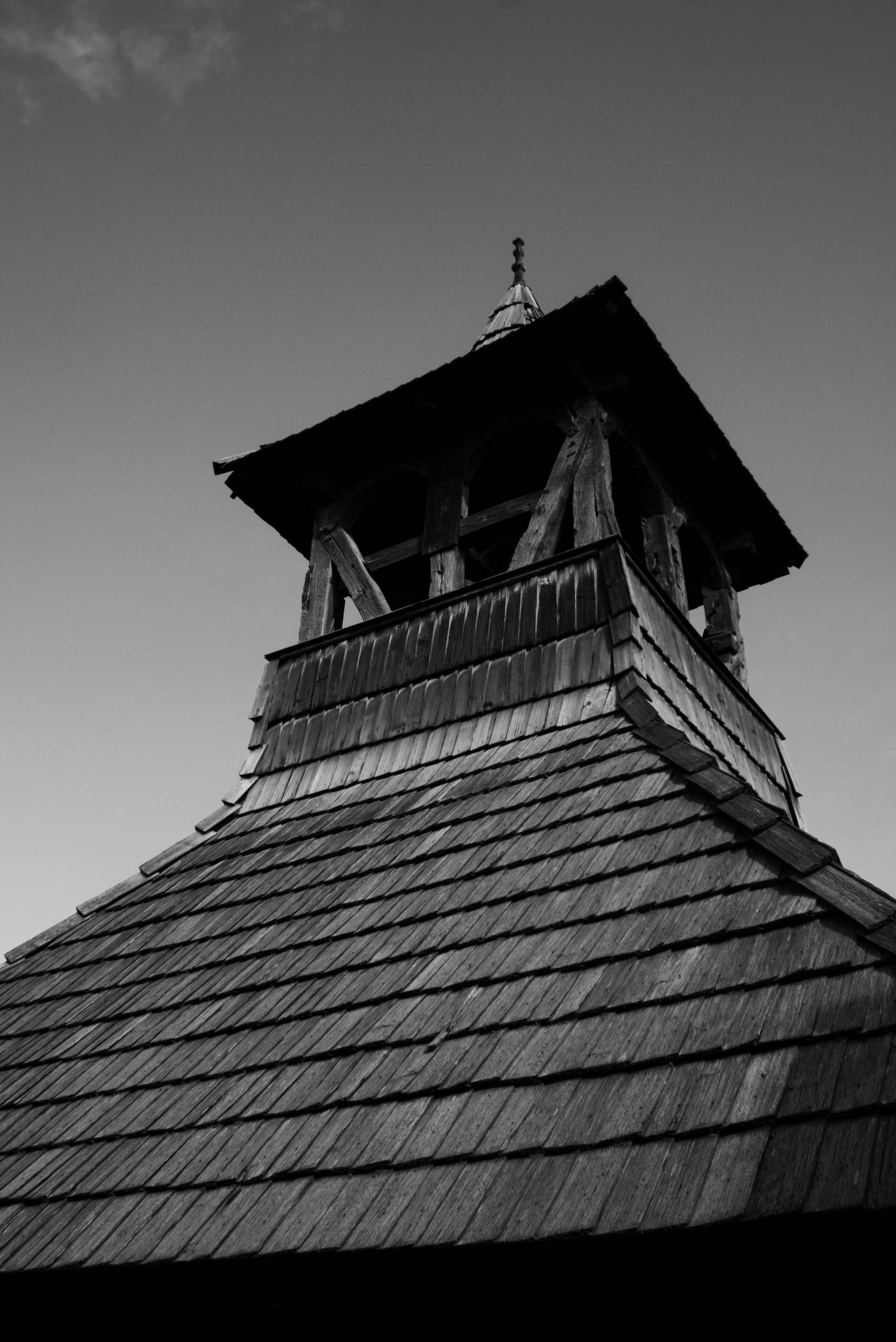 Clopotniţă de lemn langa biserica reformata 02